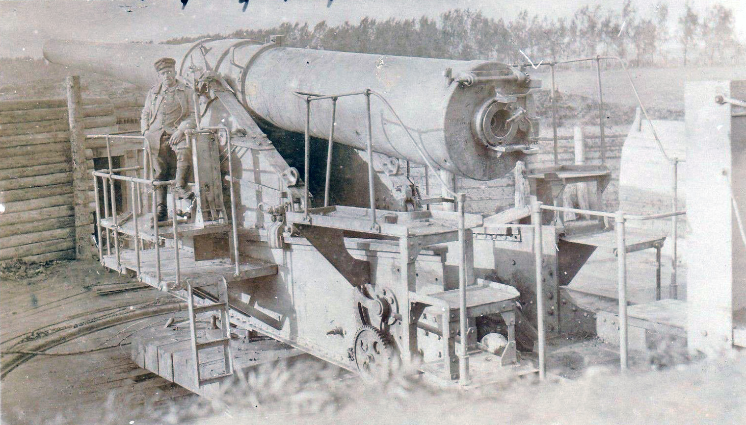 Vokiečių užgrobtas Kauno tvirtovės Canet tipo pabūklas.